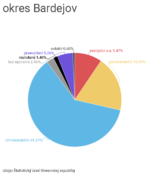 religious structure